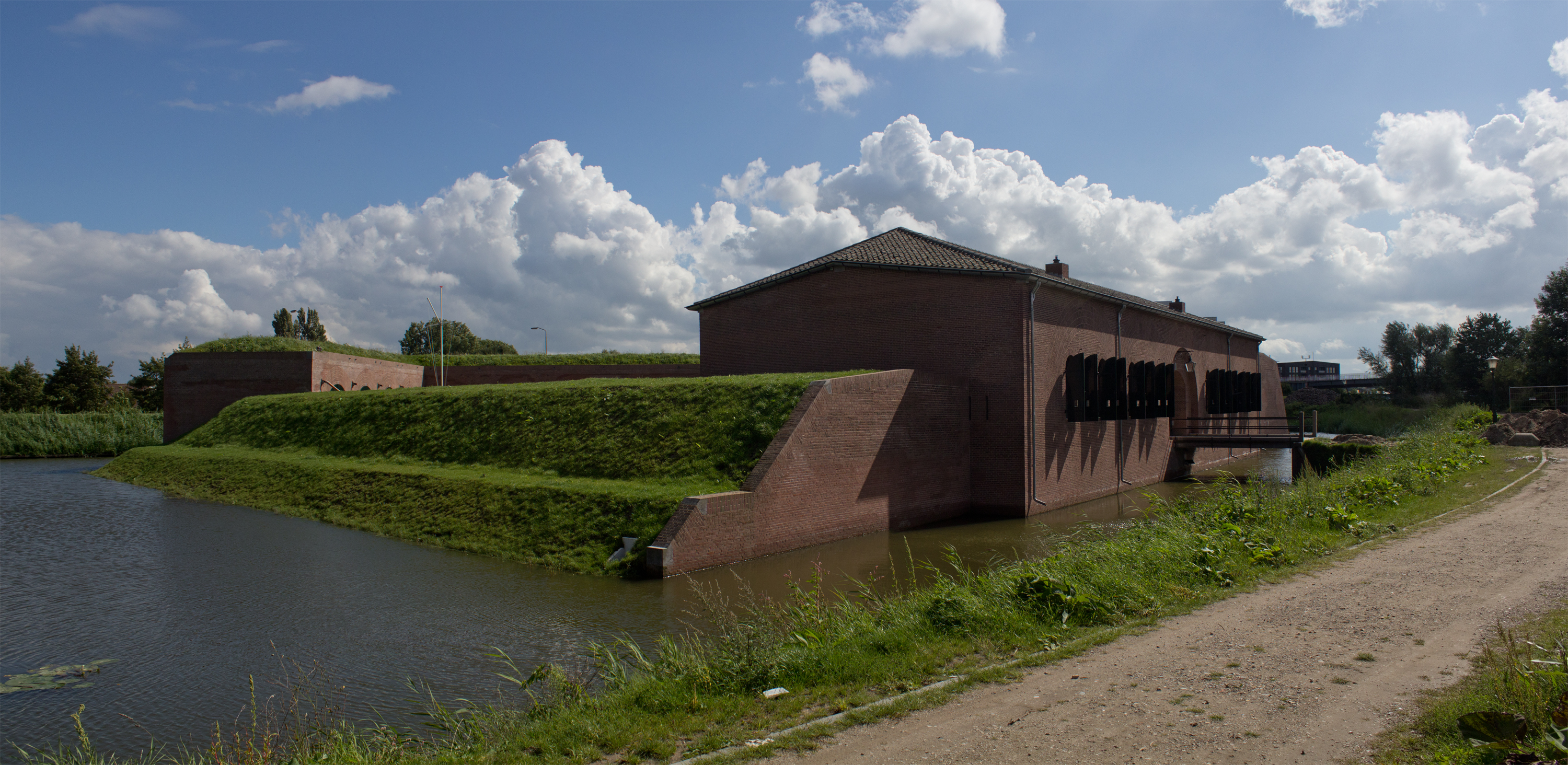 Een met steen beklede lunet, behorende tot het vestingstelsel van Geertruidenberg